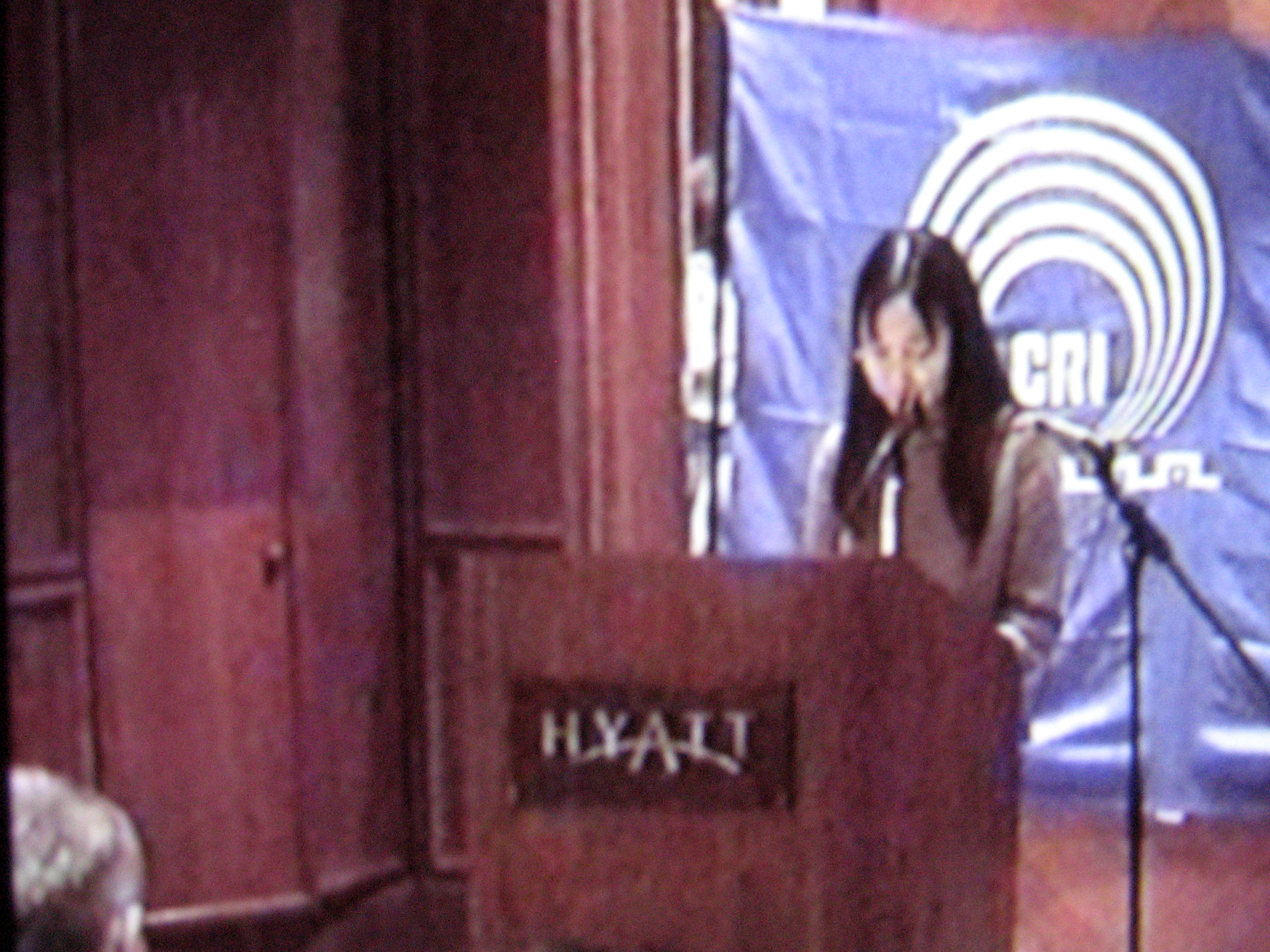 skup CRI u Beogradu u hotelu Hayat